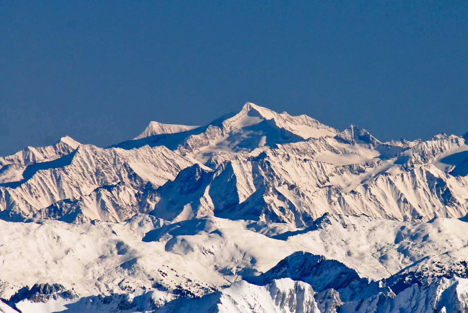 Großvenediger von Nordwesten, von der Zugspitze aus